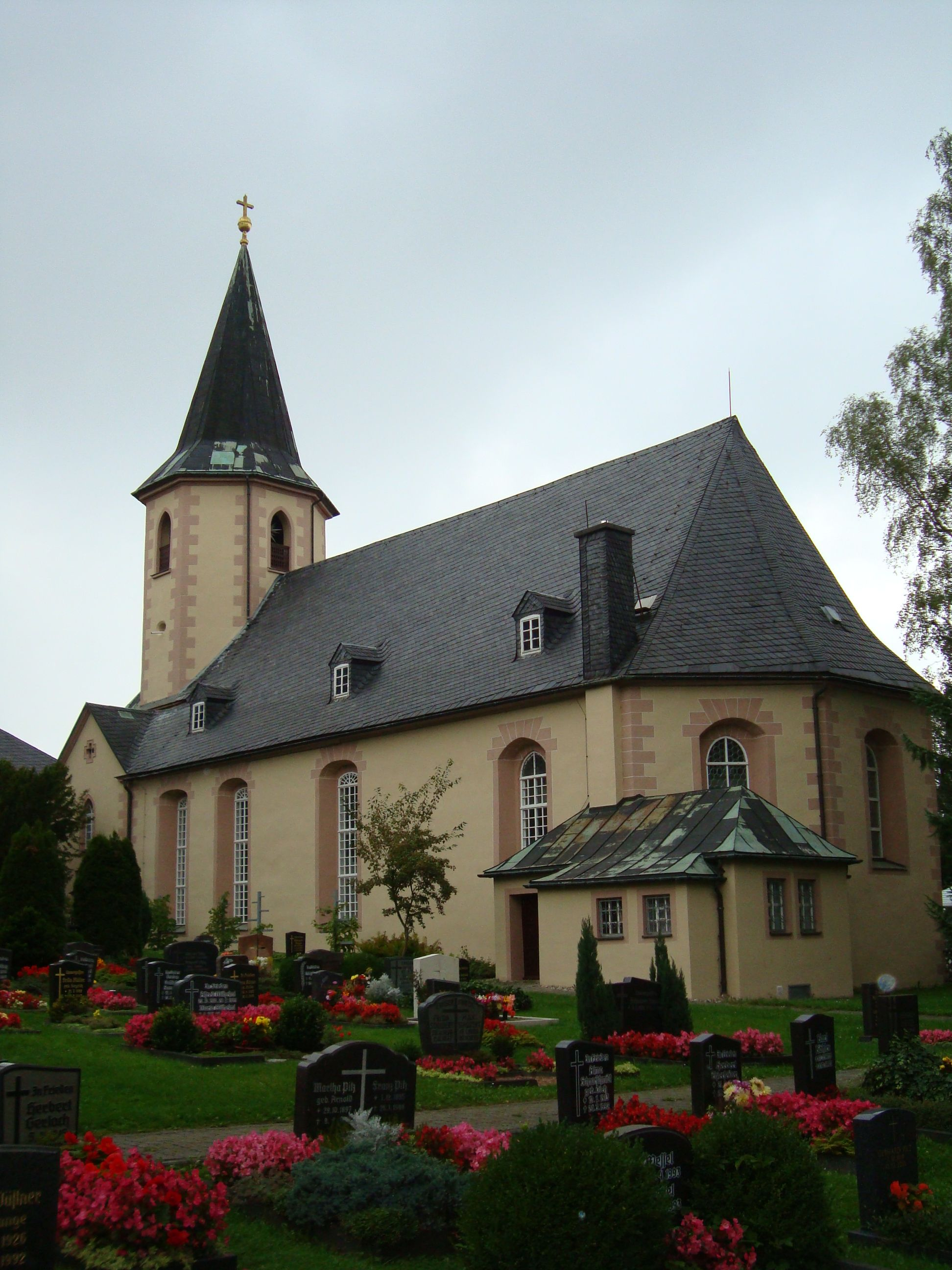 Evangelische Kirche in Gelenau im Erzgebirge